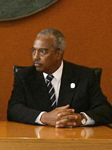 Expresidente de Guinea-Bissau, en abril de 2005